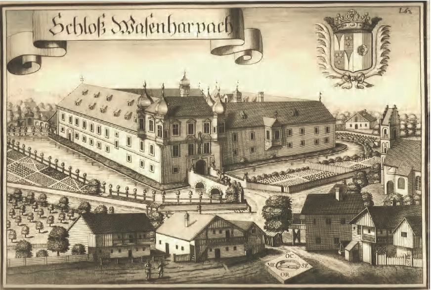 “Schloß Wasenharpach” (Haarbach bei Vilsbiburg), aus : Beschreibung des Churfürsten- und Hertzogthumbs Ober- und Nidern Bayrn. – Rentamt Landshut, 1723.